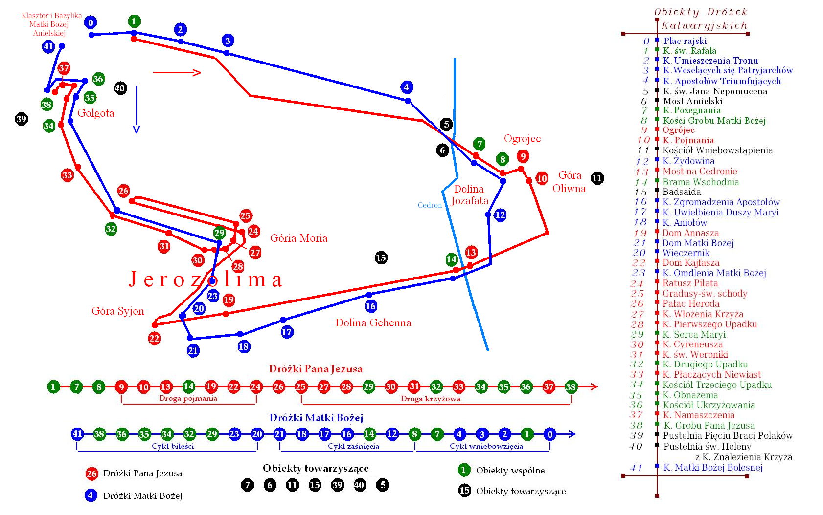 Trasy dróżek kalwaryjskich